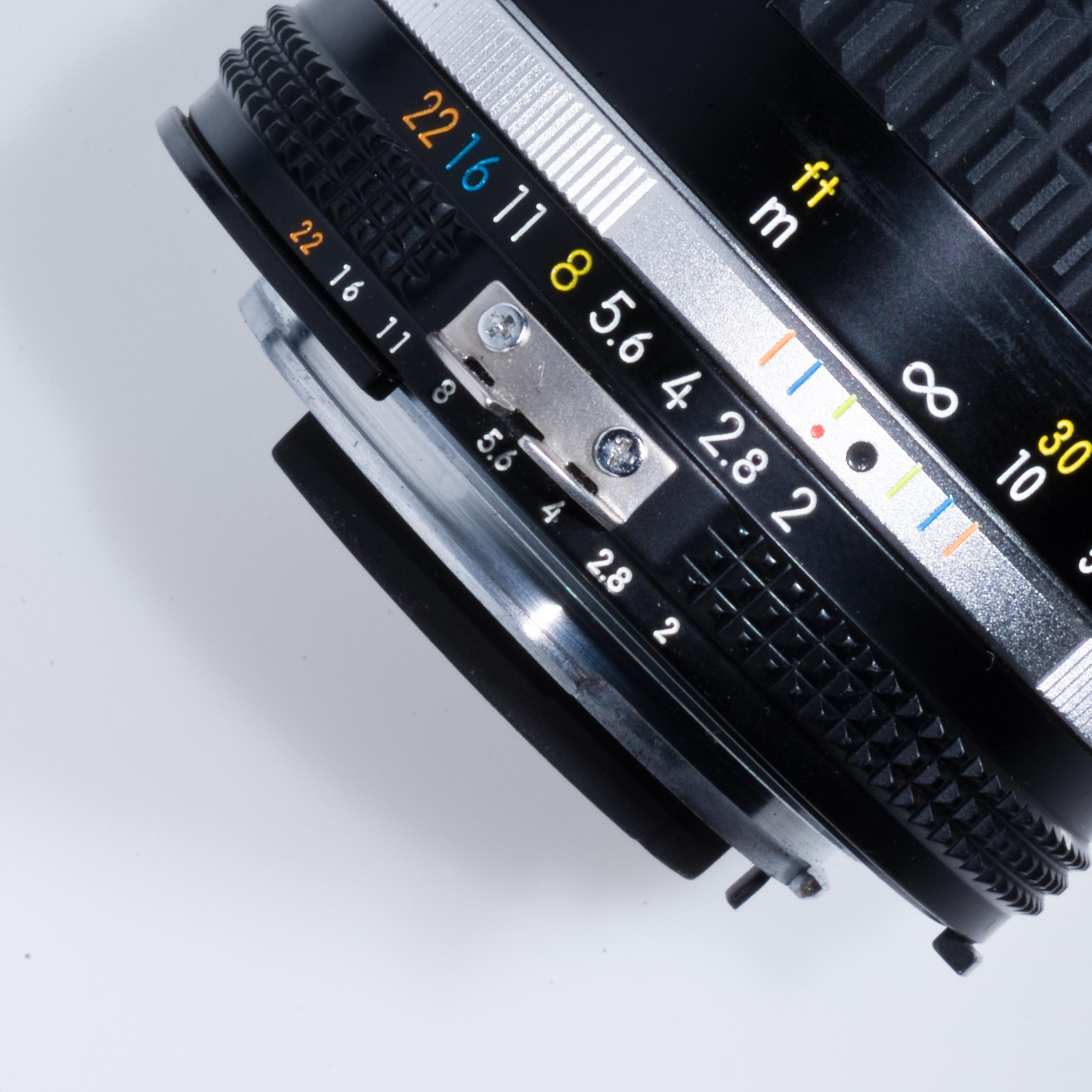 AiS Nikkor 85mm/2.0